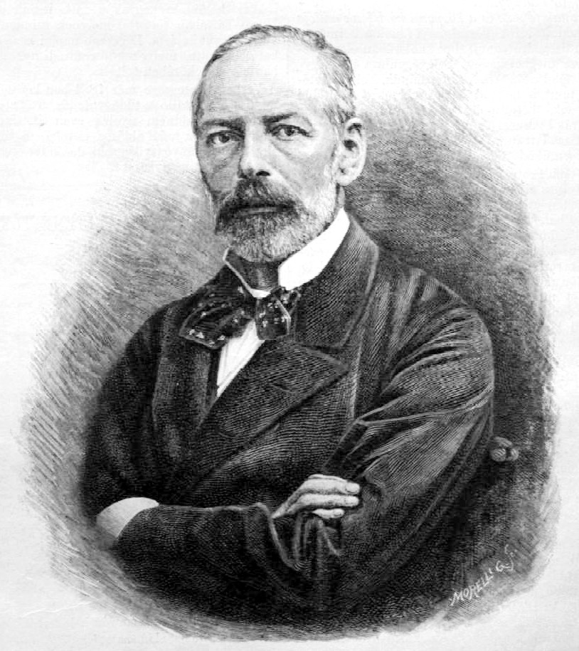 Lumniczer Sándor (1821–1892) orvos, egyetemi tanár, 1848-as honvéd törzsorvos portréja. Morelli Gusztáv metszete